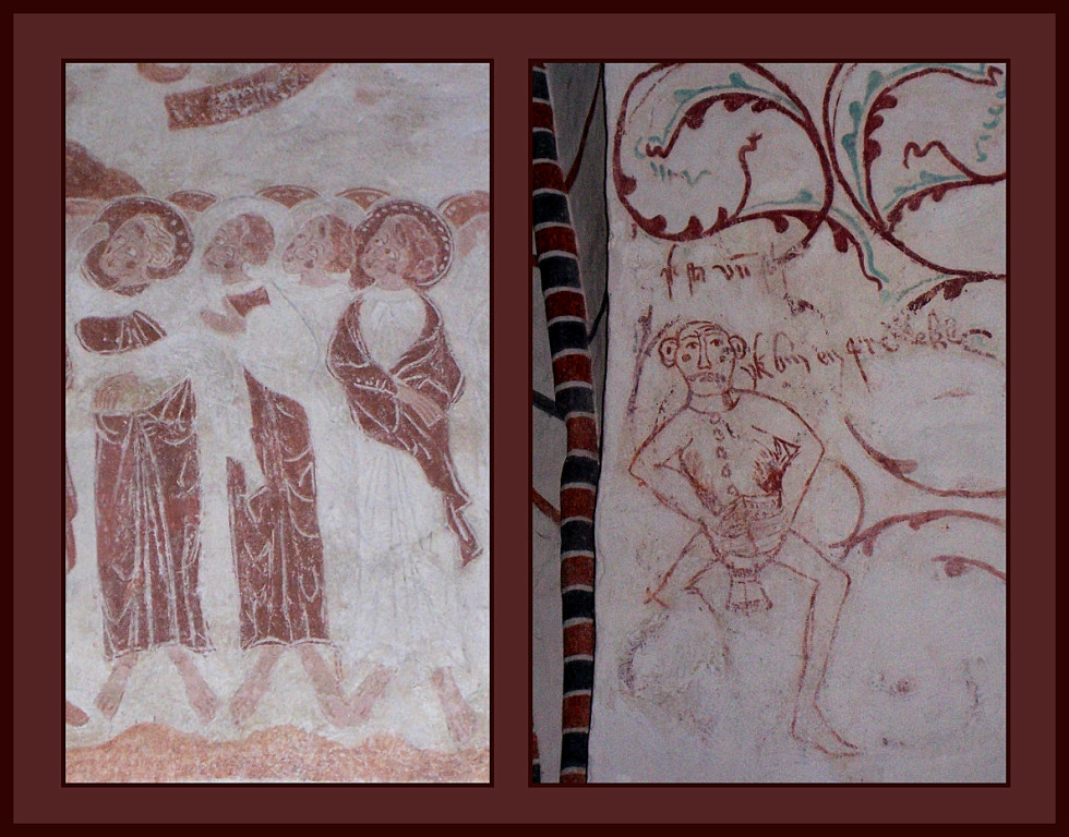 mittelalterliche Wandmalereien in der Kirche Kavelstorf, Mecklenburg-Vorpommern; die rechte Seite zeigt eine wohl einmalige, ca. 1qm große, derbe Darstellung eines onanierenden Mannes mit dem Zusatz "yk bin en gröbeker²